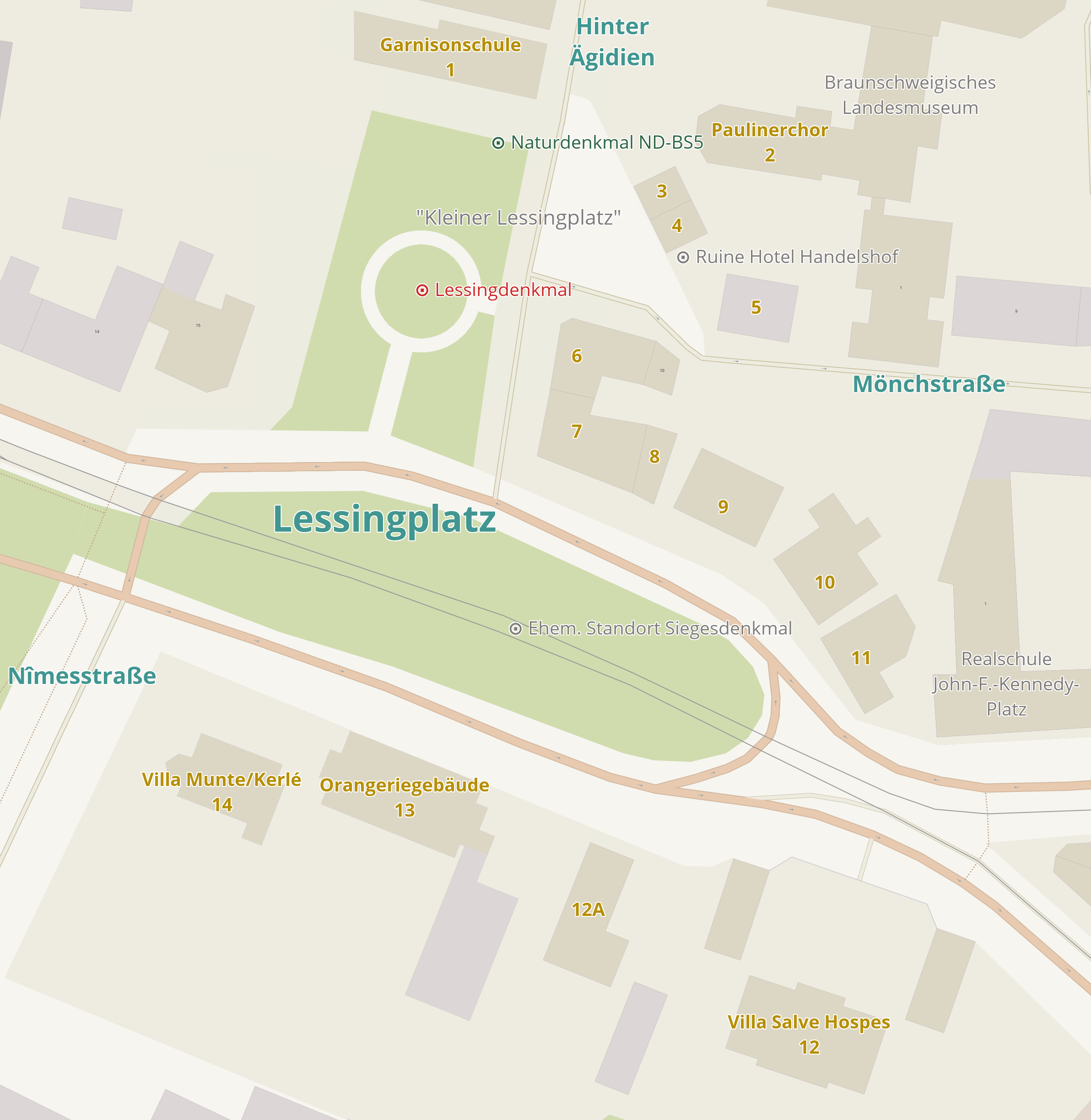 Plan des Kulturdenkmals Lessingplatz in Braunschweig. Das Lessingdenkmal ist ebenfalls ein Kulturdenkmal.